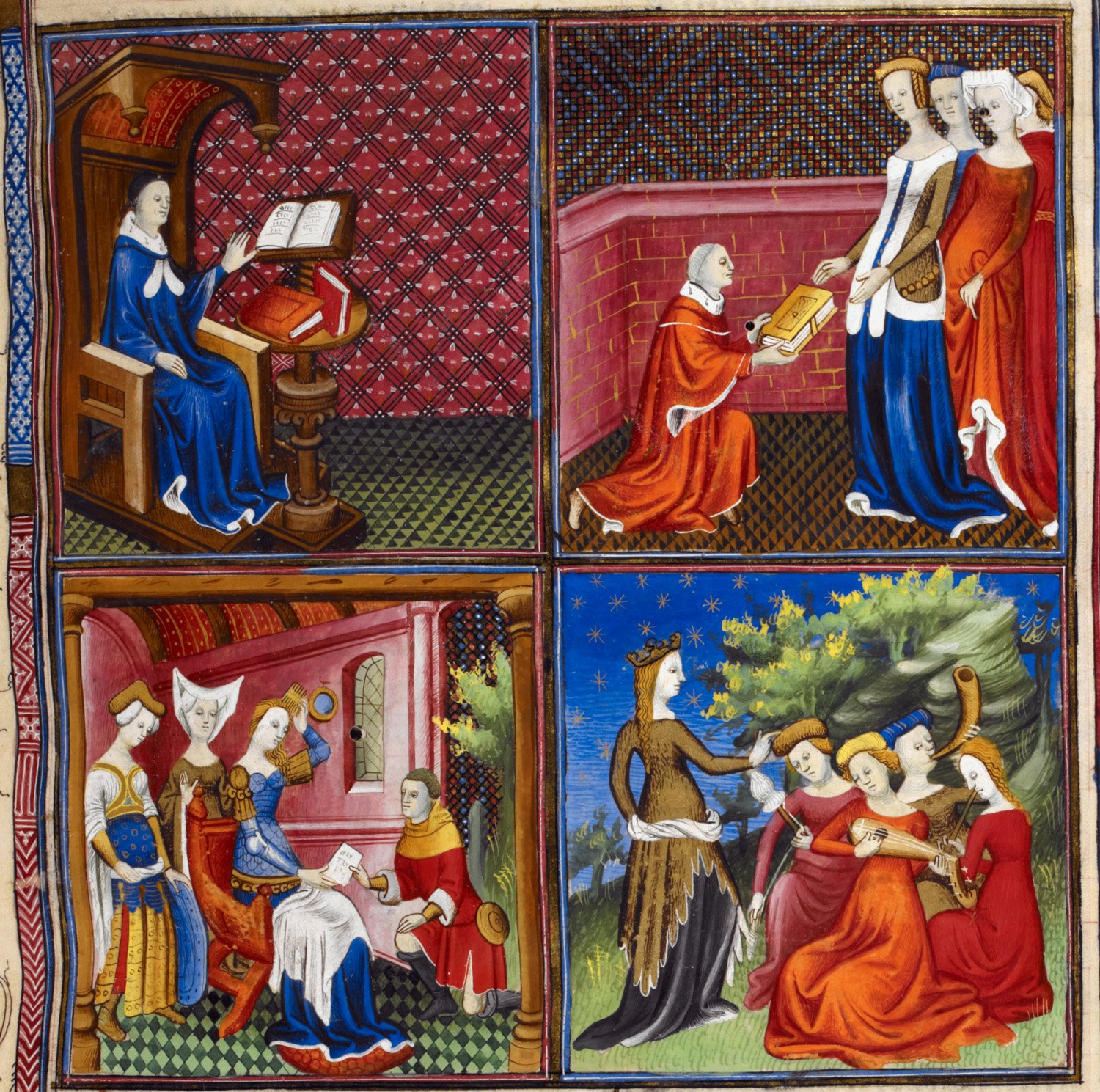 Boccaccio-f5